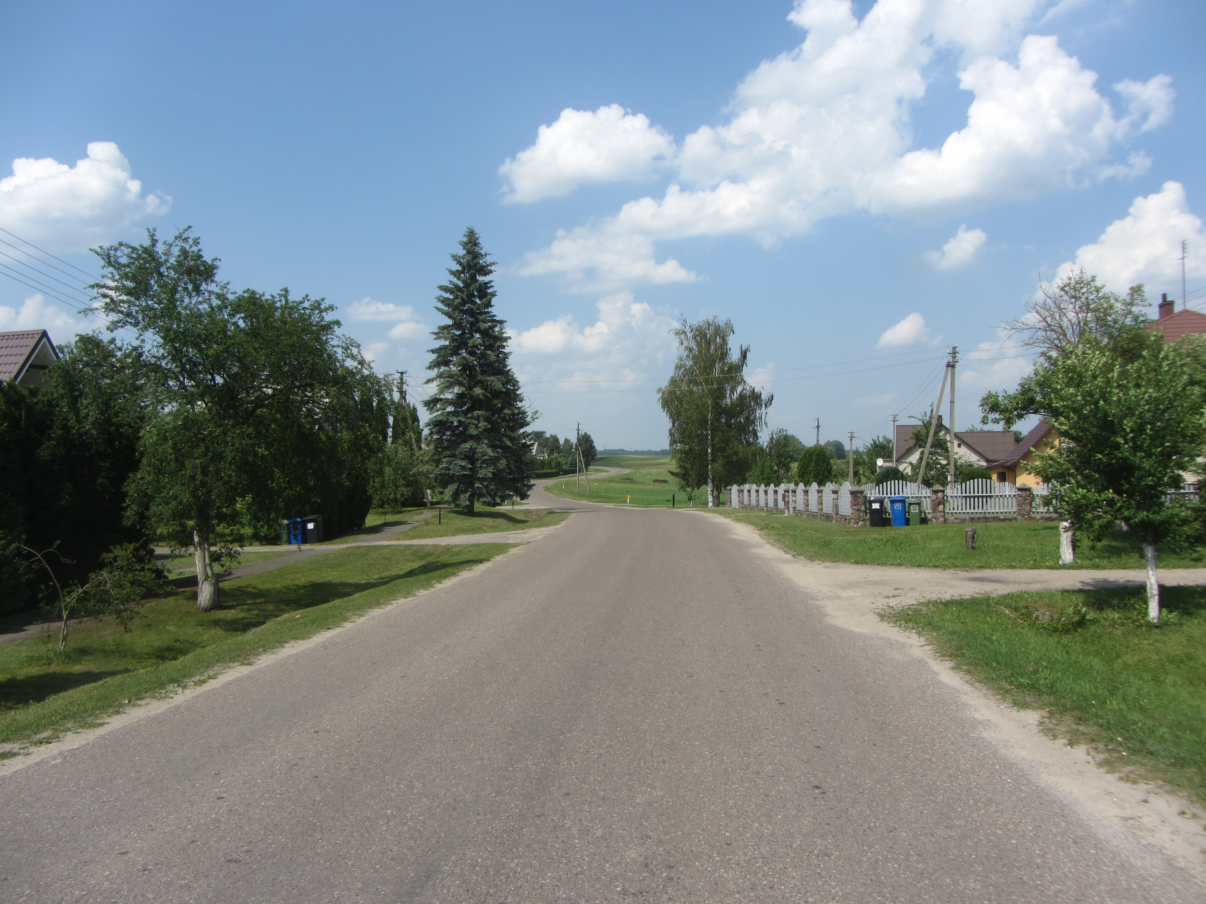 Lazdijai, Lithuania